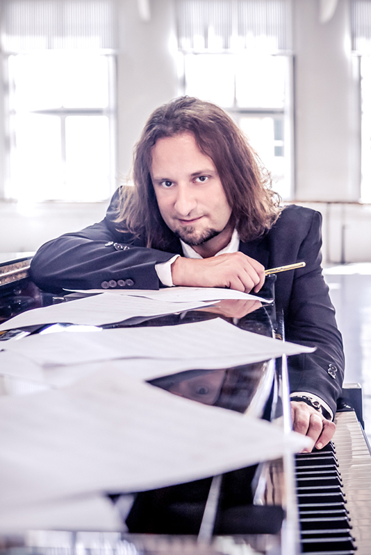 Pedro Teixeira Silva, músico dos Corvos e Secret Lie, fotografado por João Paulo Wadhoomall (JPW)